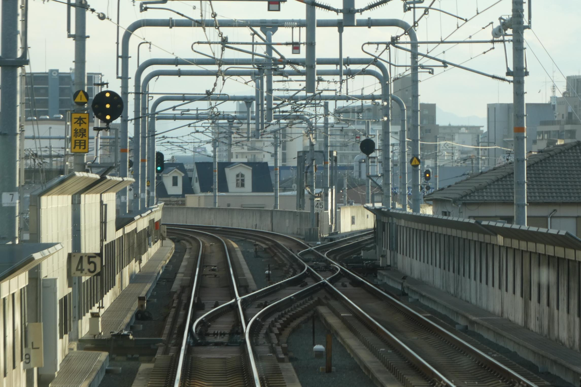 JR西日本 おおさか東線 正覚寺信号場。